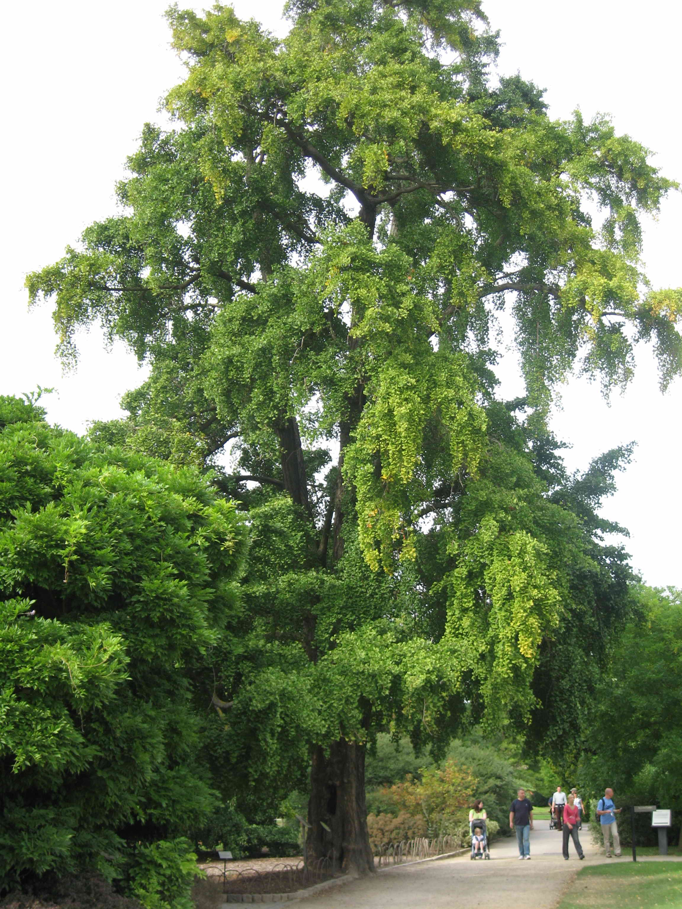 Kew Ginkgo biloba